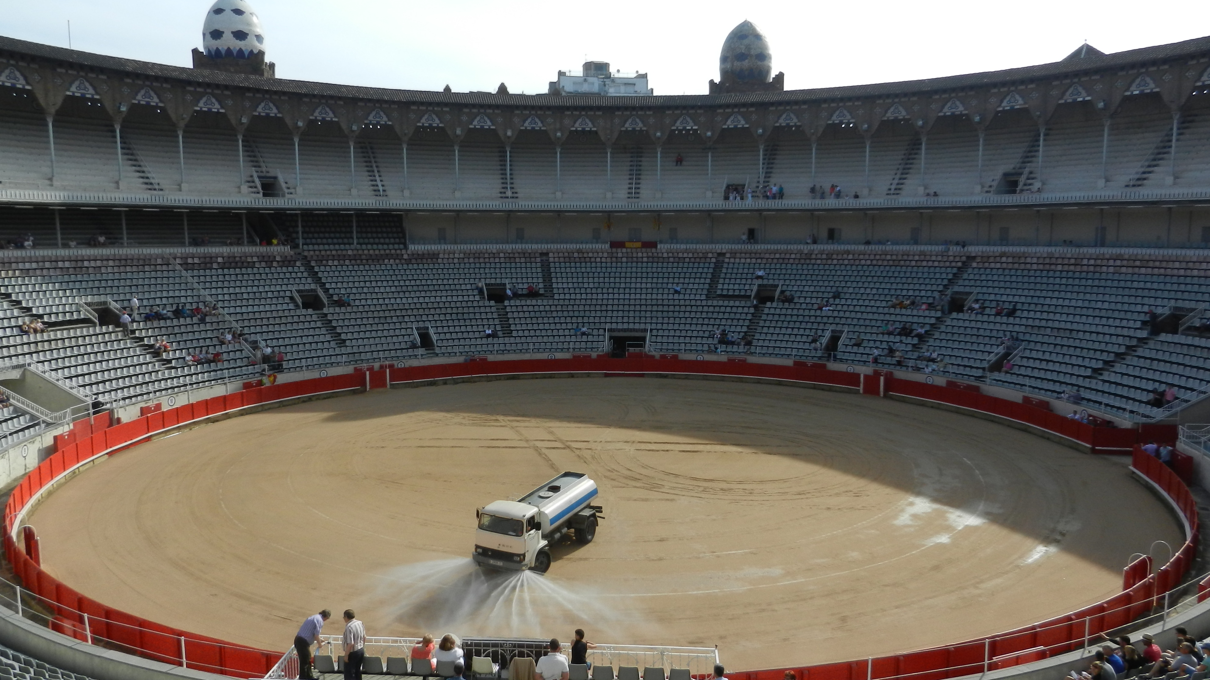 подготовка арены